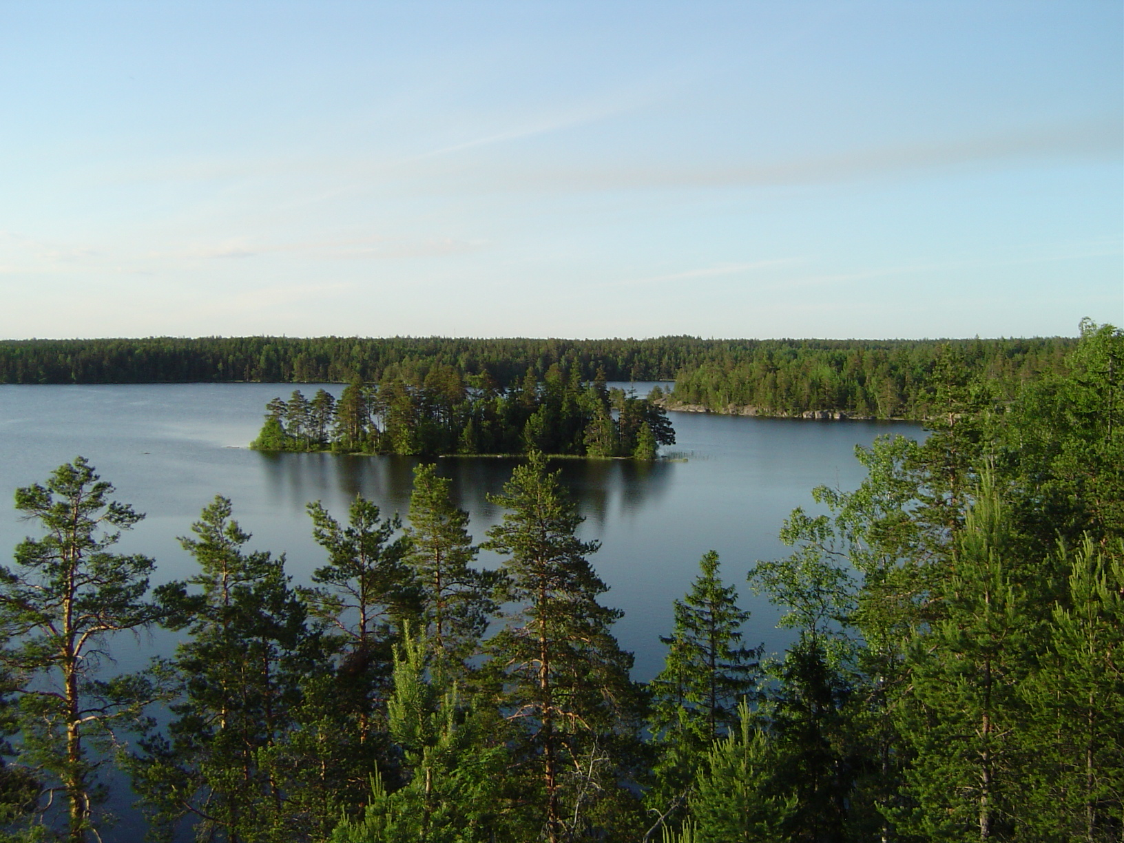 Lake Meiko in Kirkkonummi, Finland